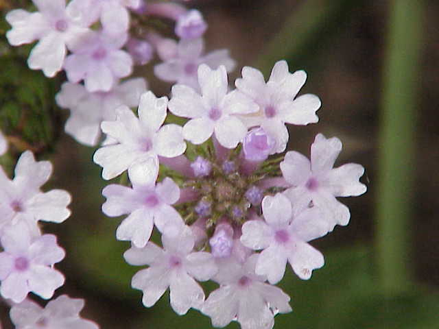 Species: Verbena rigida Family: Verbenaceae Image No. 2